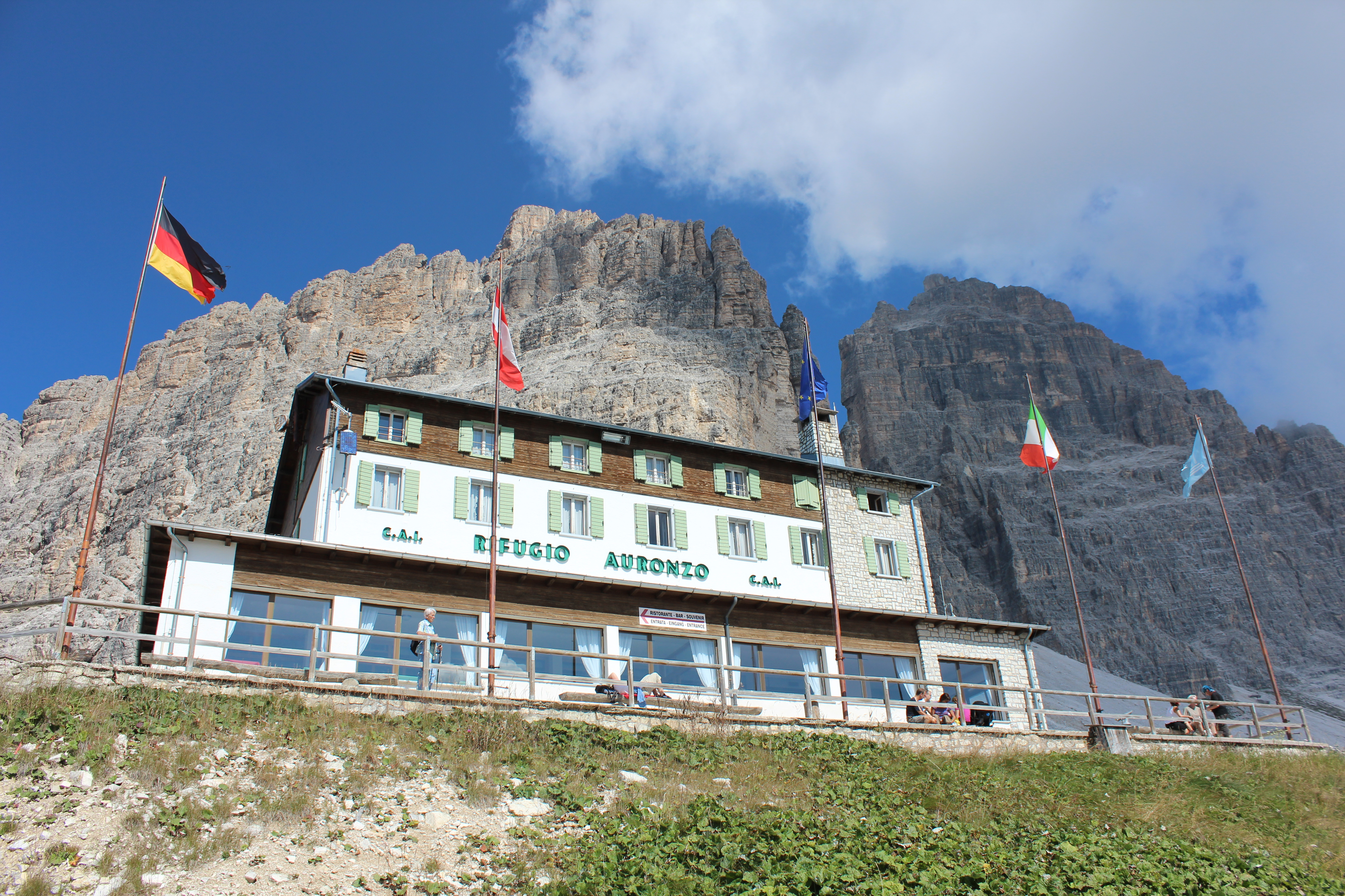 Auronzohütte